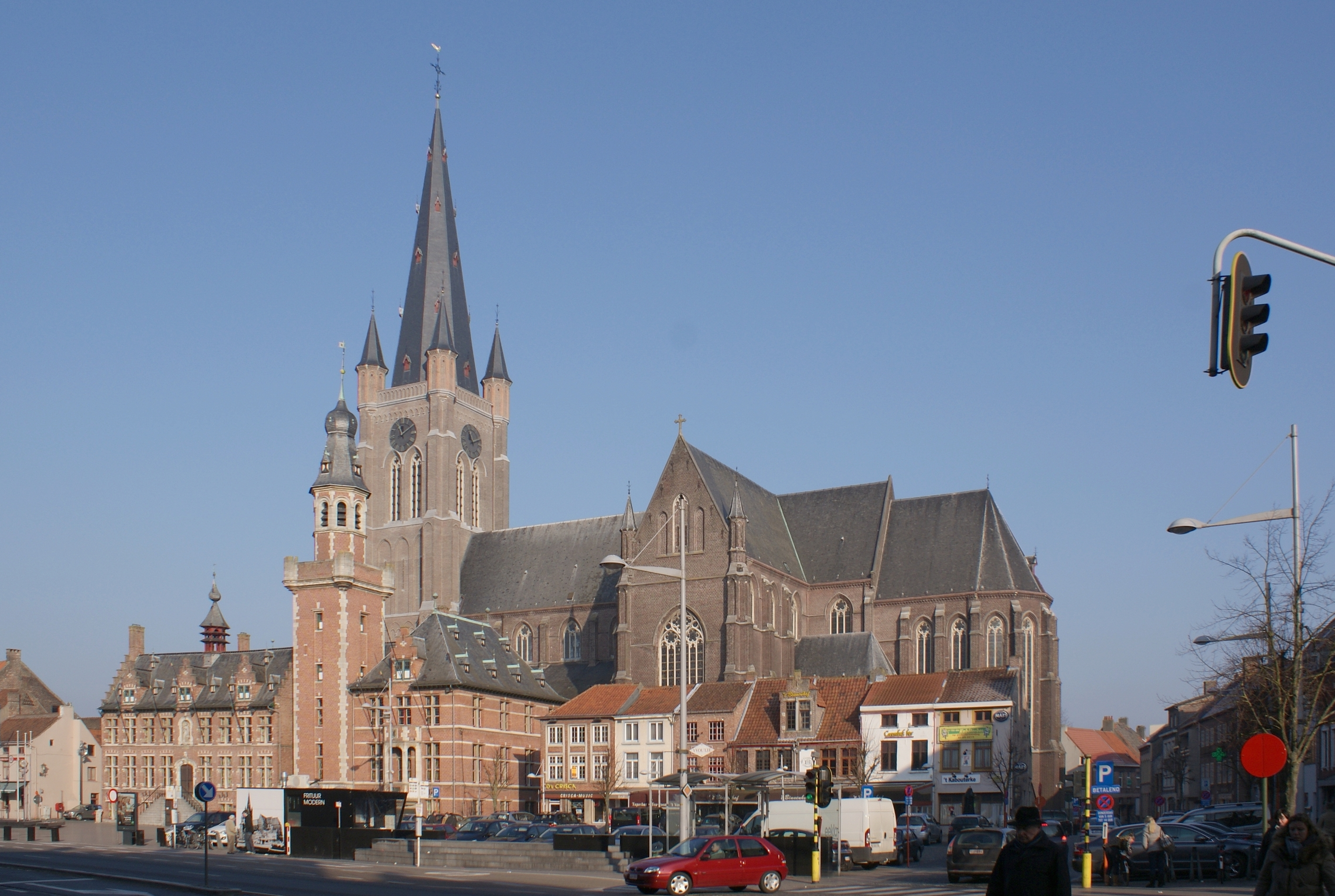 Sint-Vincentiuskerk (Eeklo) - Gezien vanop de Markt